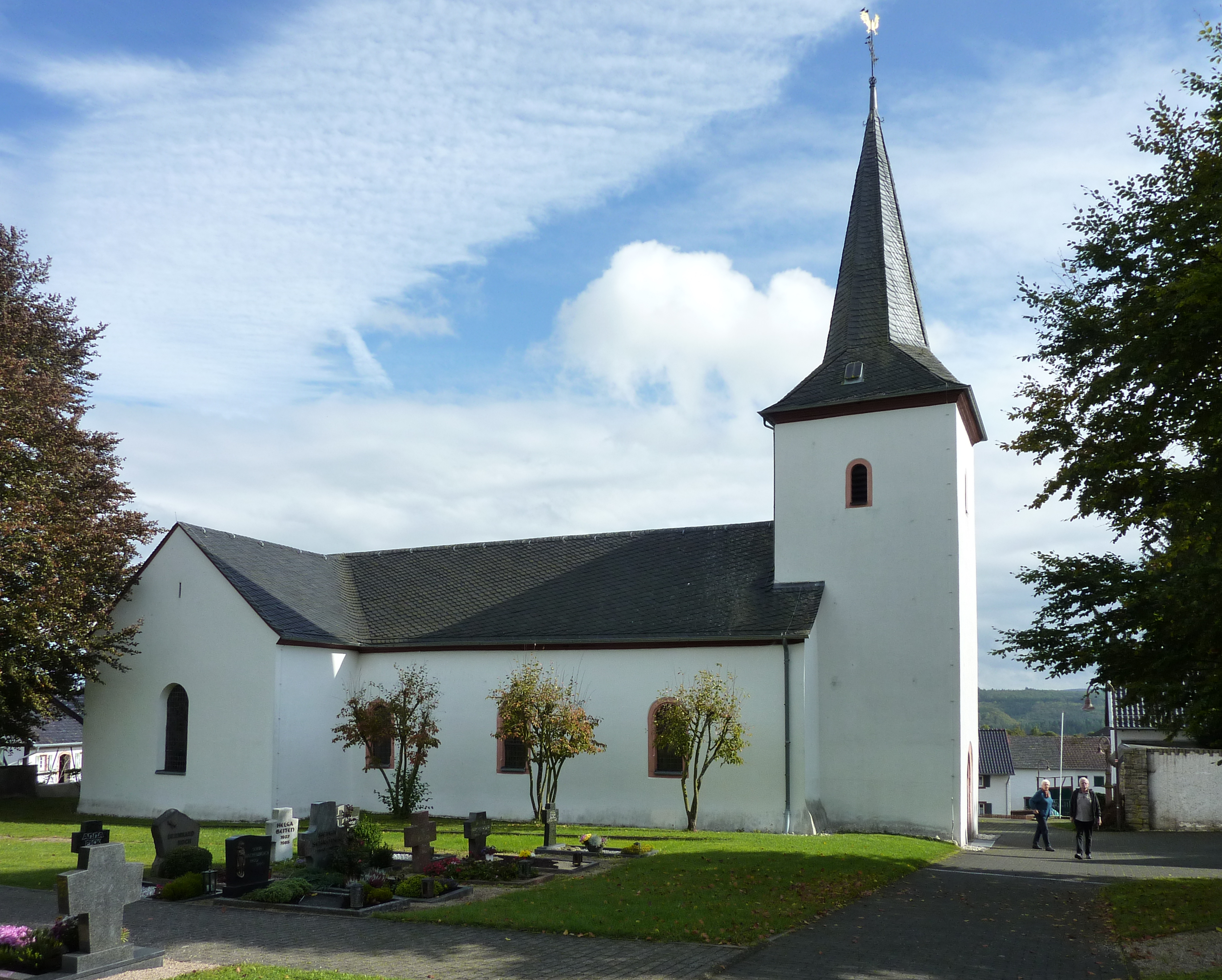 Uedelhoven, Kreuzstr. 24, kath. Pfarrkirche St. Maria Himmelfahrt 1, von N